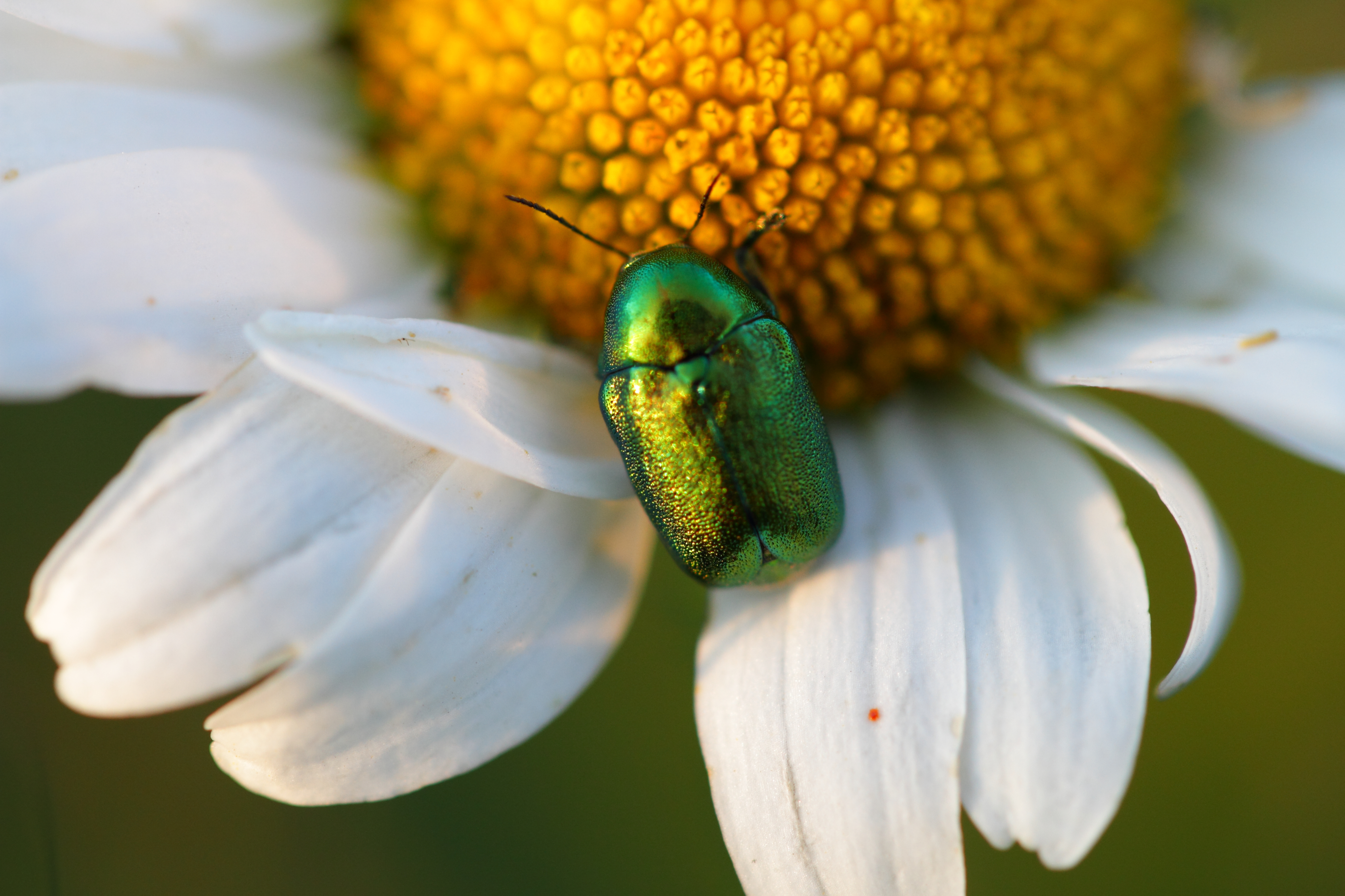 Ein Blattkäfer auf der Hohen Wand.